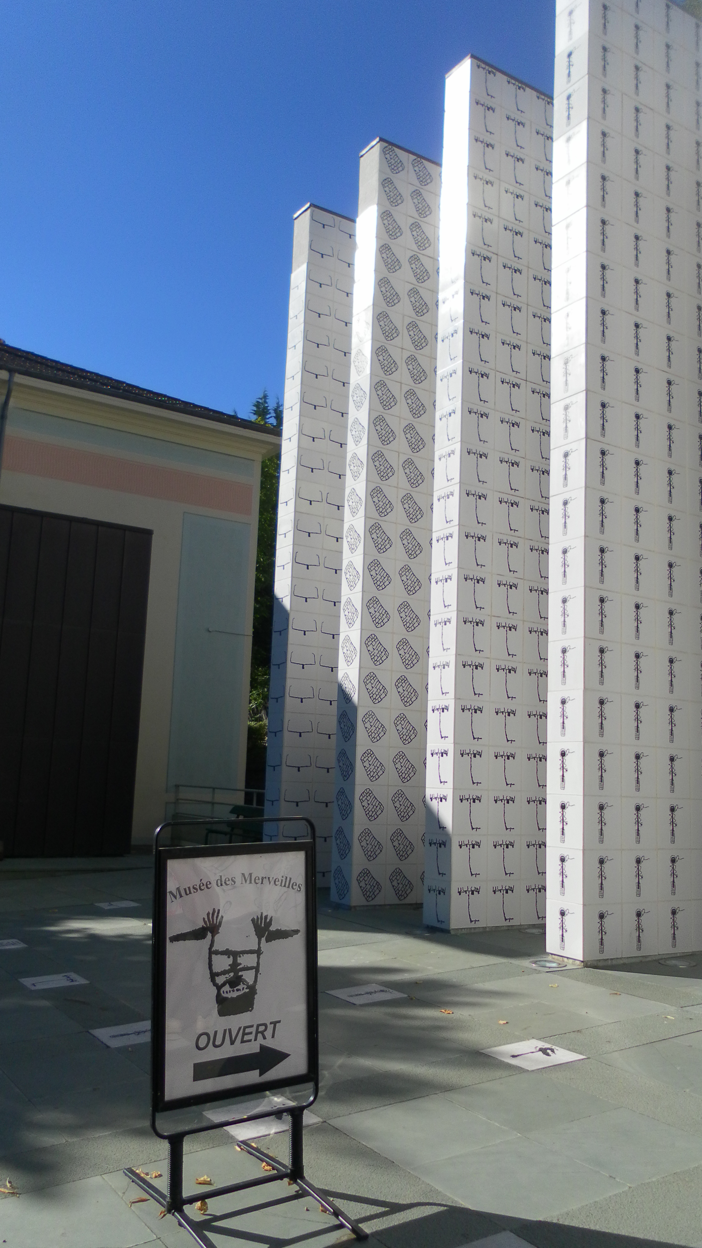 Musée des Merveilles à Tende (06)